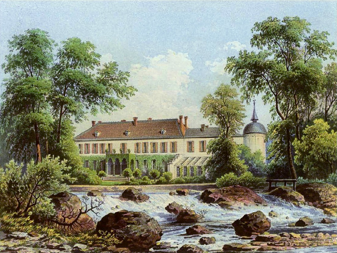 Rittergut Thale, Kreis Aschersleben, Provinz Sachsen